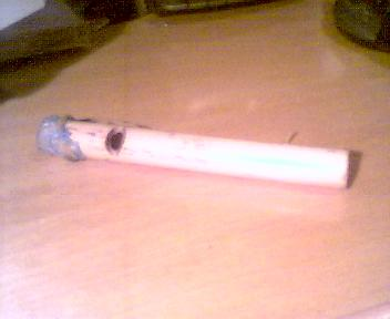 Foto cedida por el usuario Jecanre a wikipedia, de su colección personal.